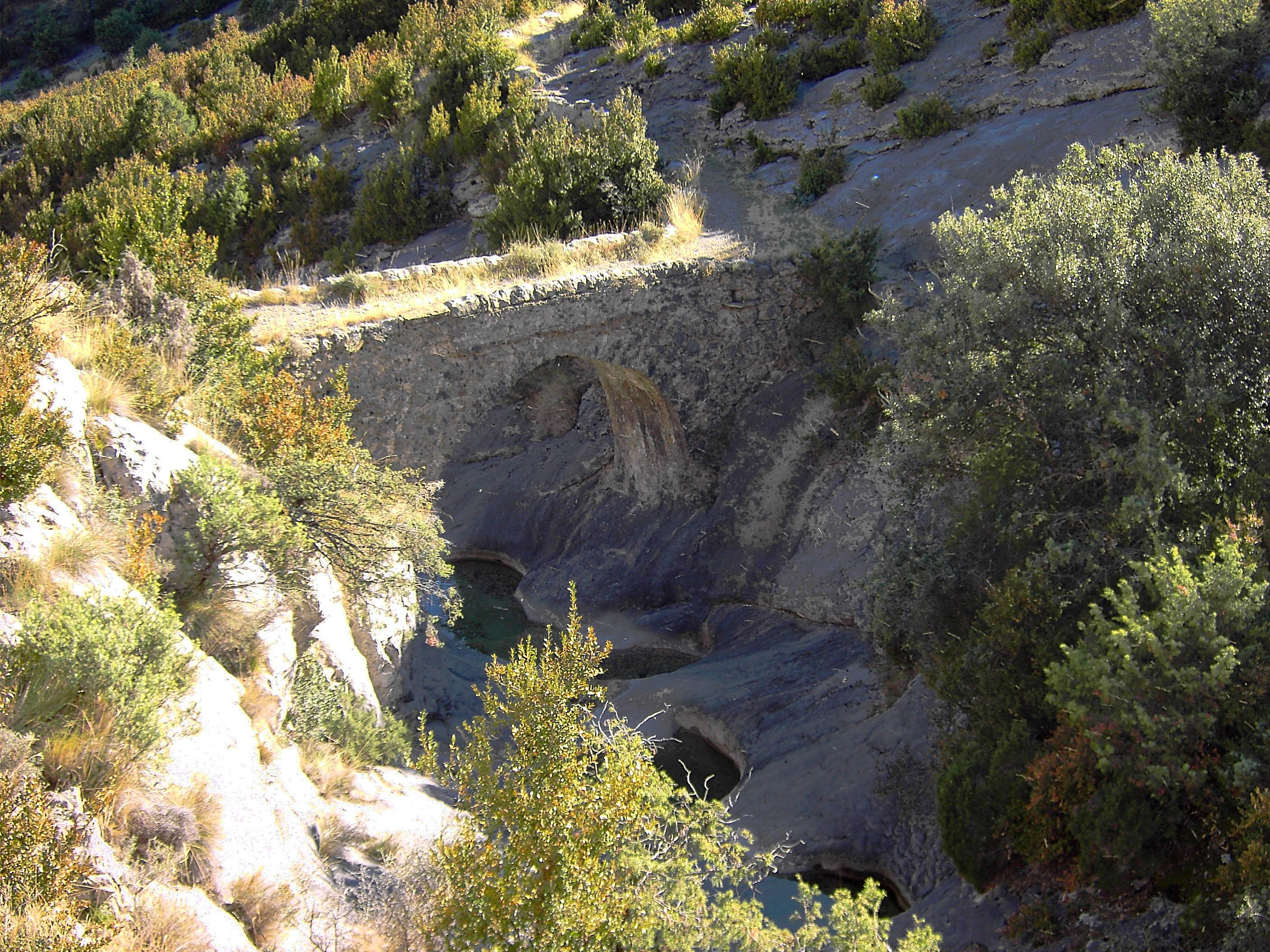 Puente de acceso a Ascaso en el camino desde el valle de Vió, situado por encima del Barranco de Ascaso y sus numerosas pozas.